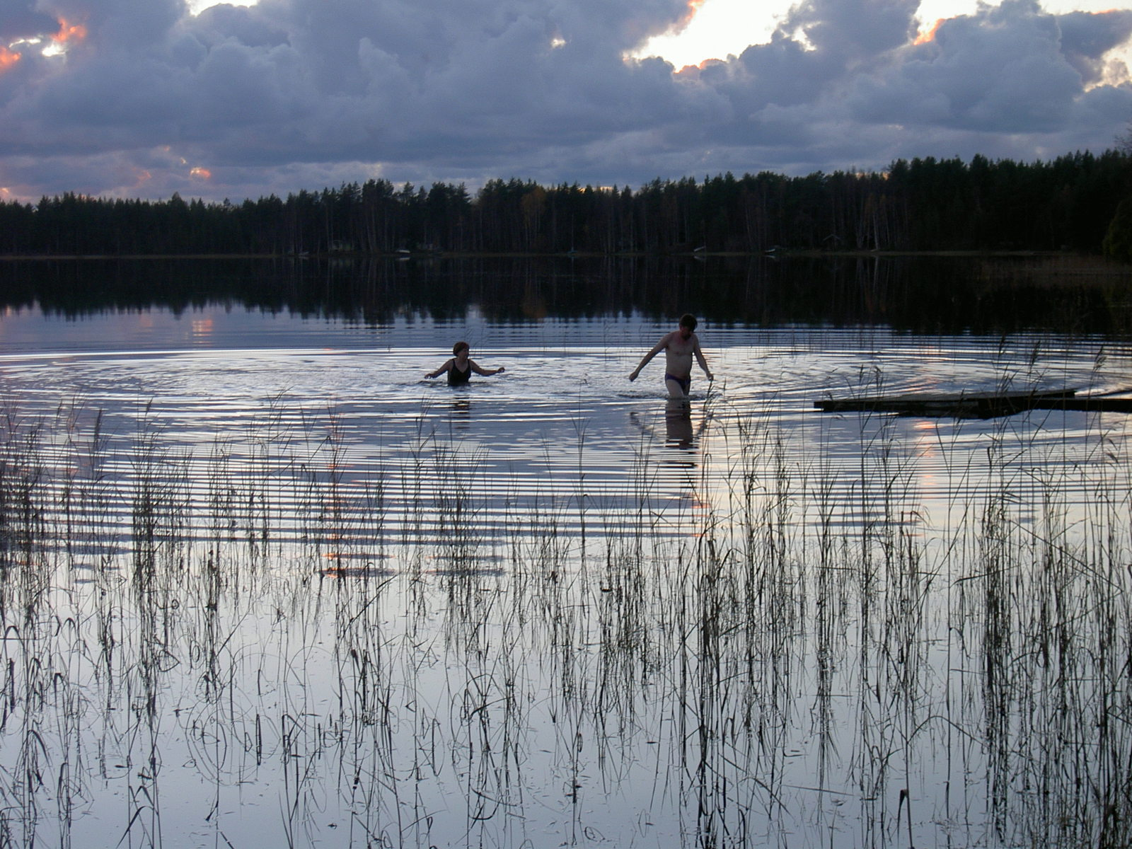 People having a bath after sauna in the Oulu-region. Sajat digitalis kamera. --Math 2005. október 6., 16:02 (CEST) hivatkozando forras: Brendel Matyas